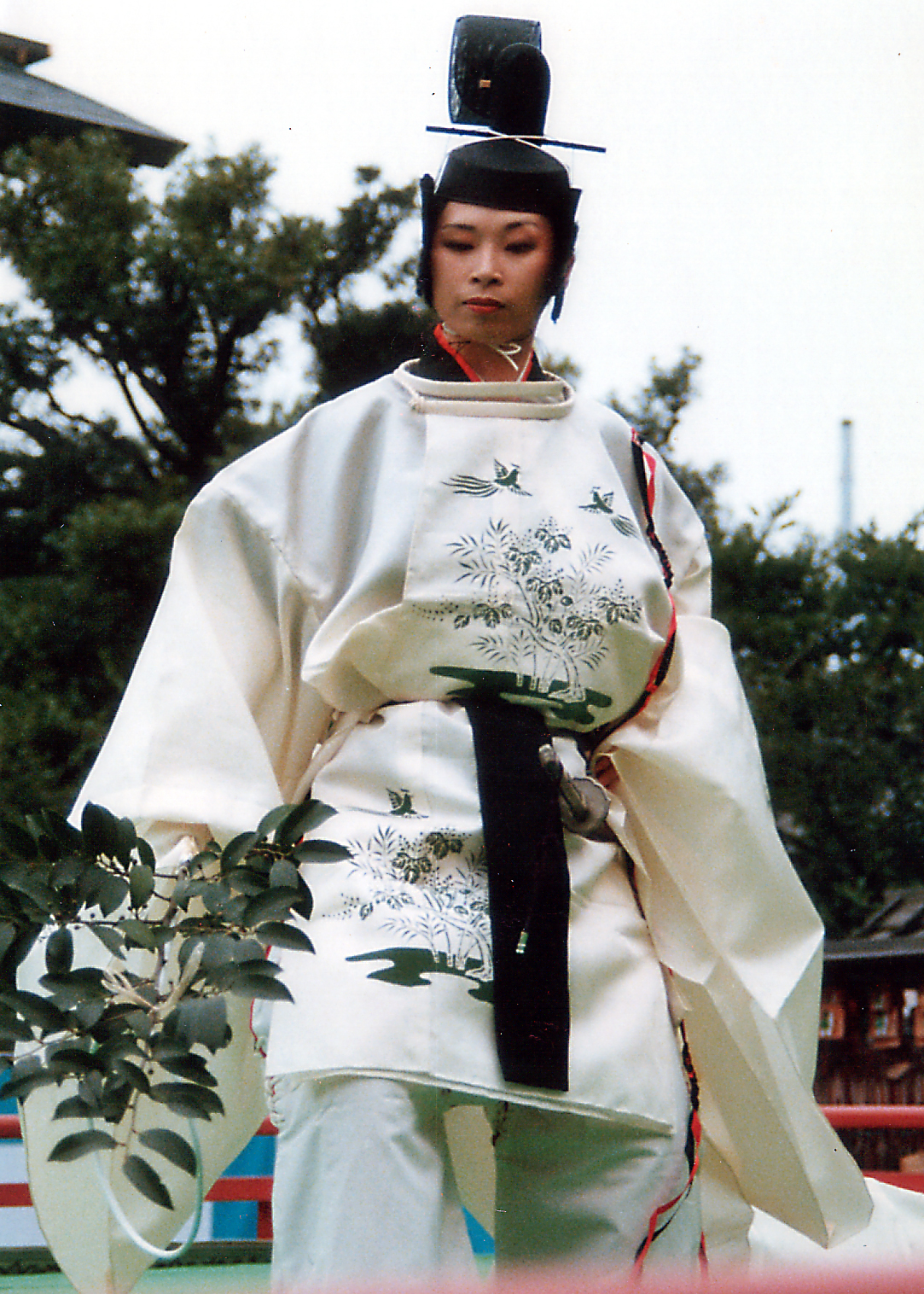 Ninjo-no-mai(chief priest dance)